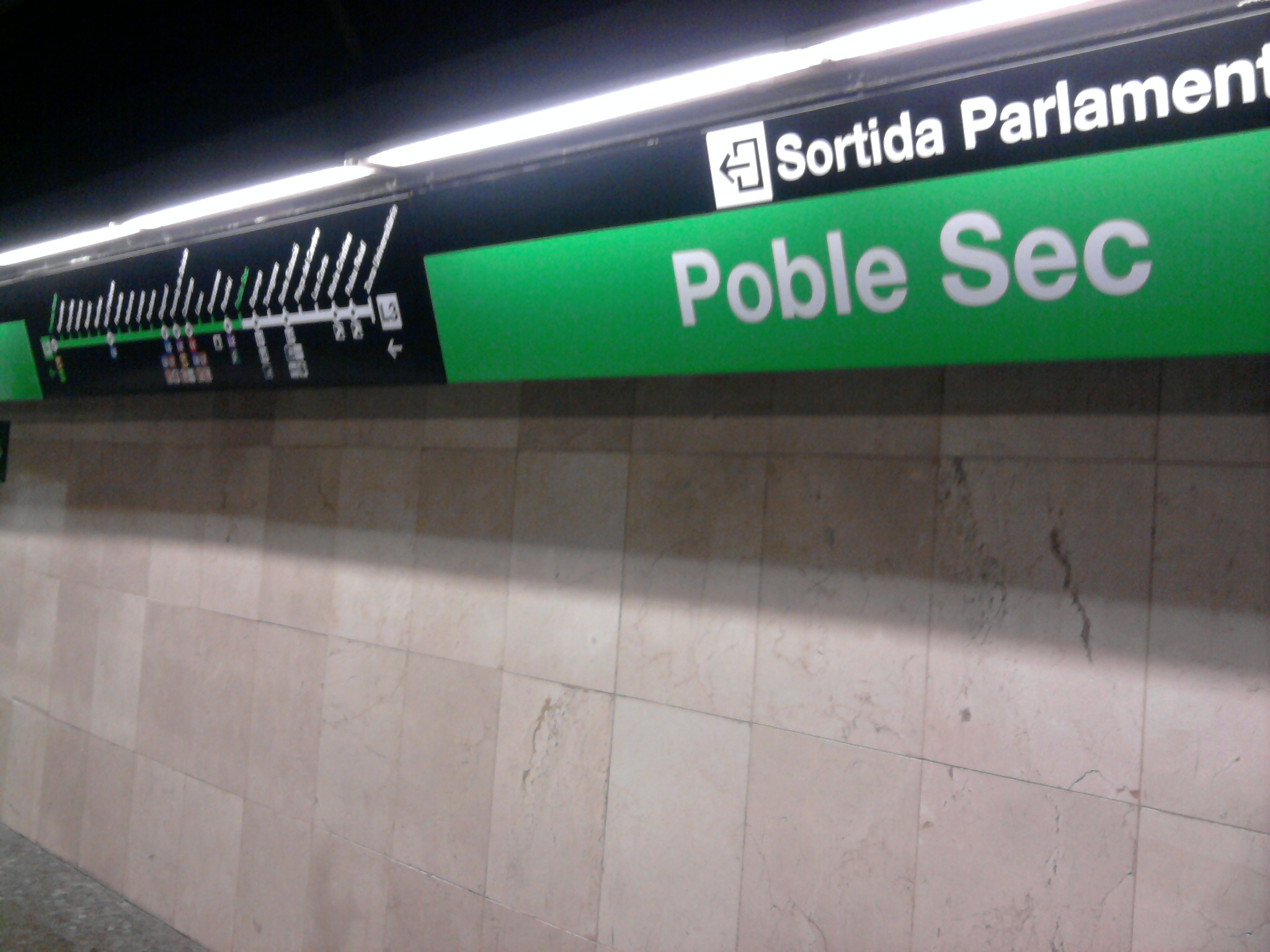 Foto capturada per la meva càmara a l'estació de Poble Sec (Metro de Barcelona).